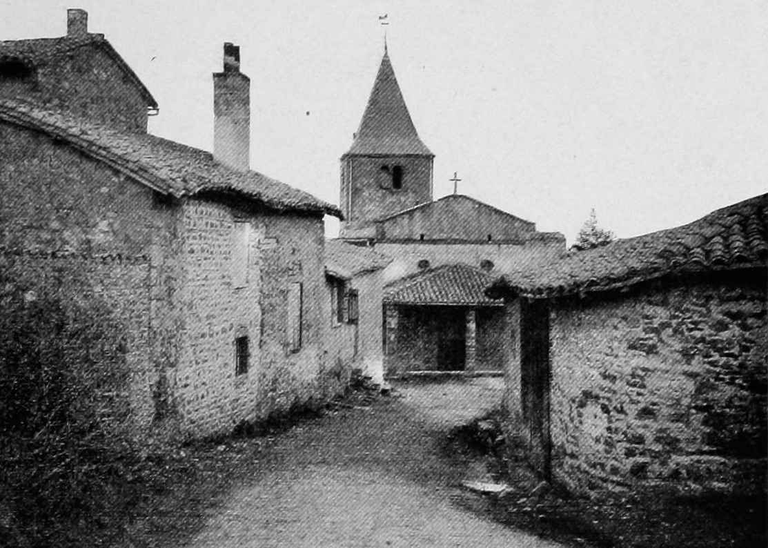 Dictionnaire illustré des communes du département du Rhône. Tome 2 / par MM. E. de Rolland et D. Clouzet.